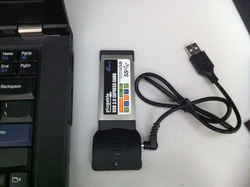 USB 3.0 ekspresskaart lisatoitejuhtmega